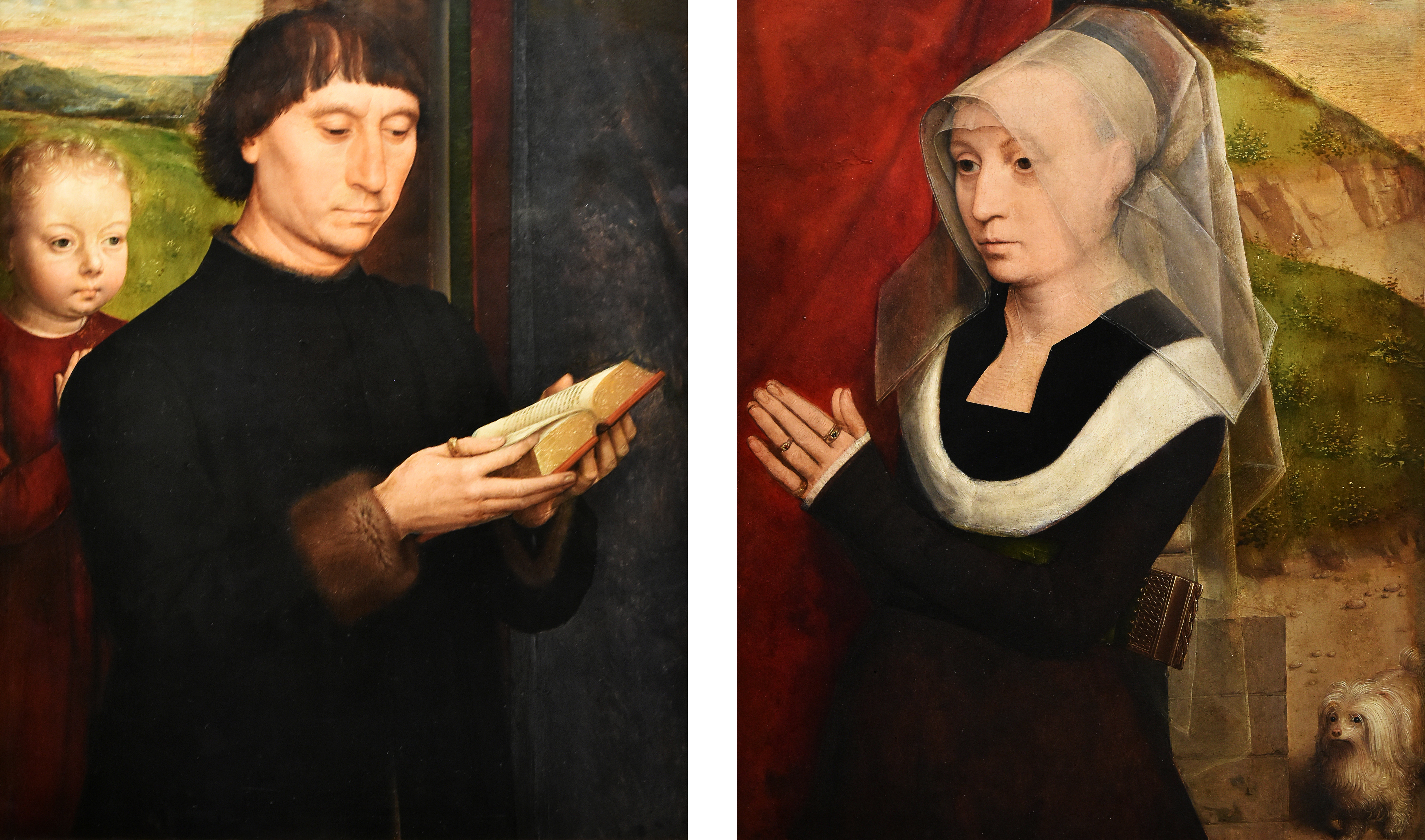 Combinatie van twee schilderijen van Hans Memling (ca.1430of40-1494) - geschilderd bij het huwelijk van beiden: Biddende man met overleden zoon - Biddende vrouw met hond - in het Noordbrabants Museum te 's Hertogenbosch. De zoon werd er later bijgeschilderd toen hij overleed (zie kruisje op zijn kleding)